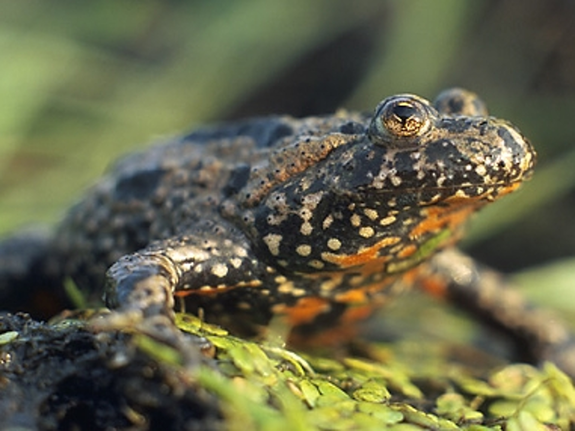 Bombina bombina